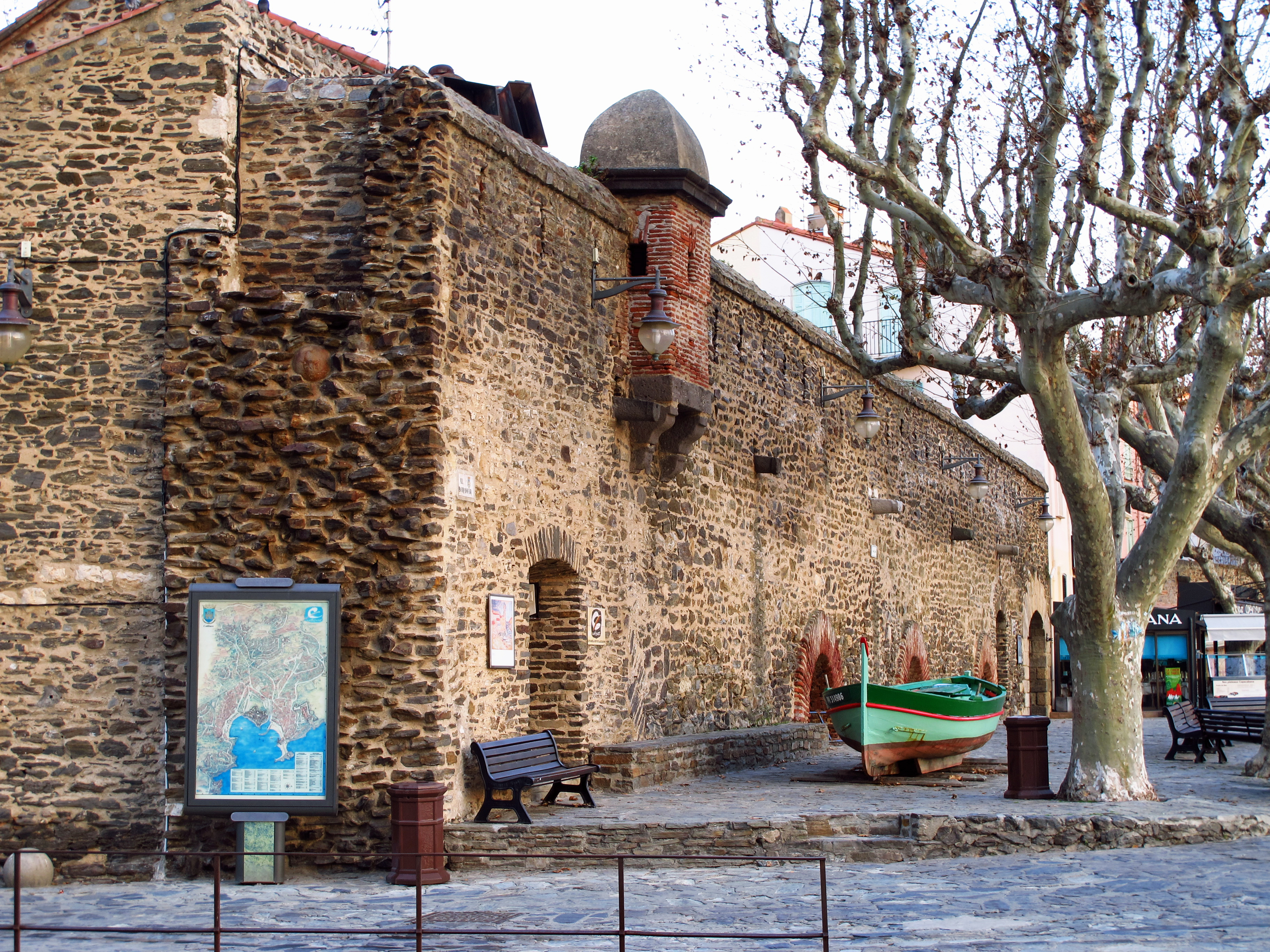 Fortificació de l'Artilleria i antigues muralles de Cotlliure